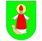 Herb sołectwa Stanisławice